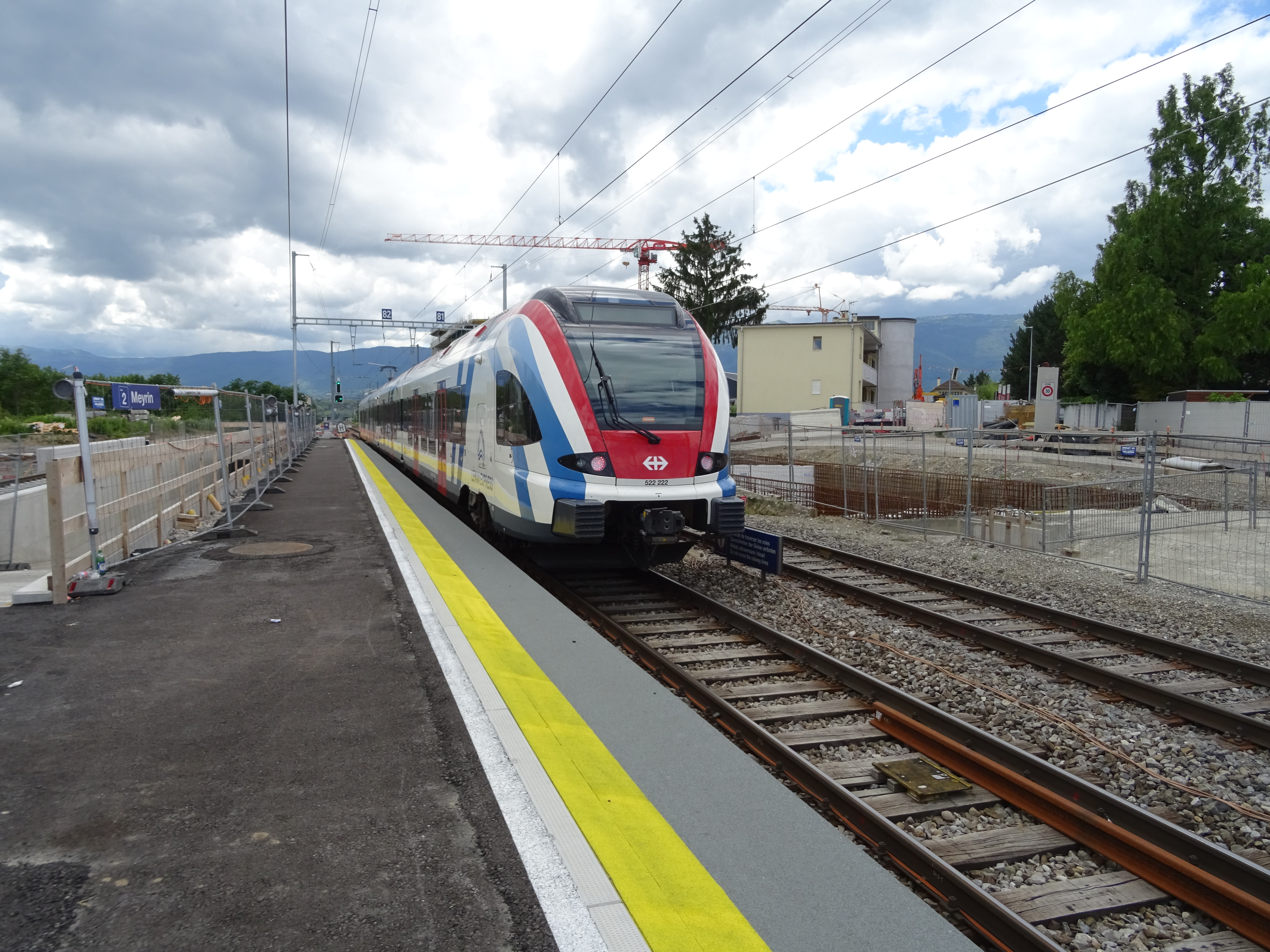 Départ d'un RABe 522 de Vernier. Il assure un service de la ligne L5 du Léman Express à destination de la Plaine.